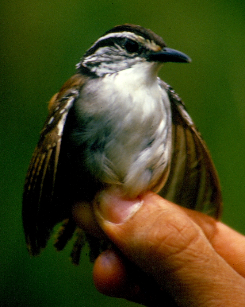 Henicorhina leucosticta